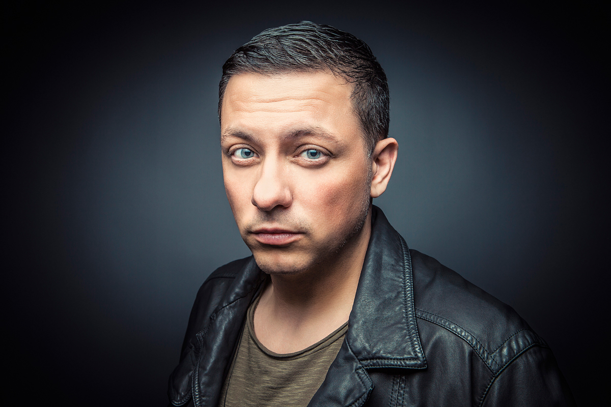 Pressefoto: Kostas Triandafilidis alias DJ Polique